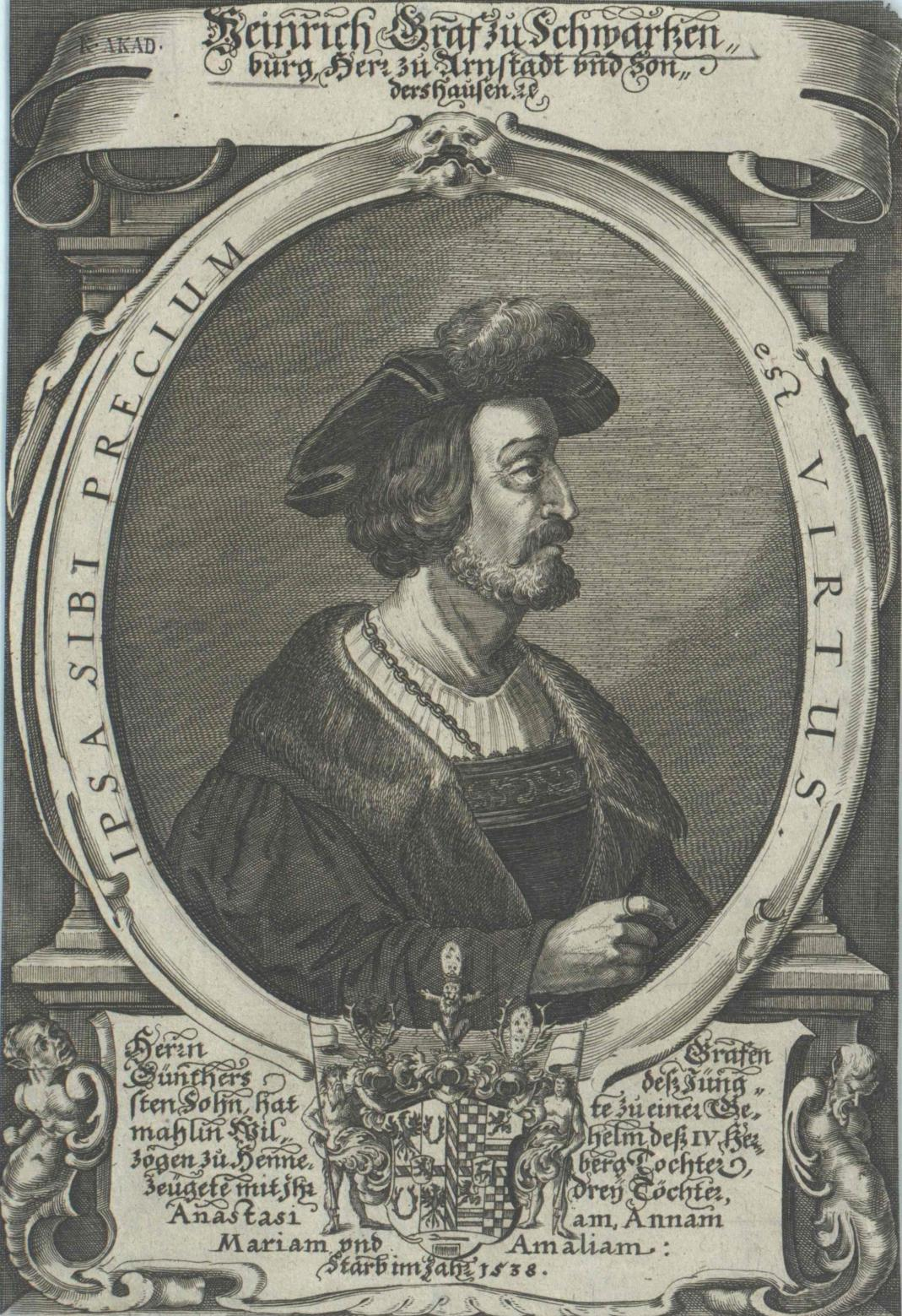 Hendrik XXXII van Schwarzburg